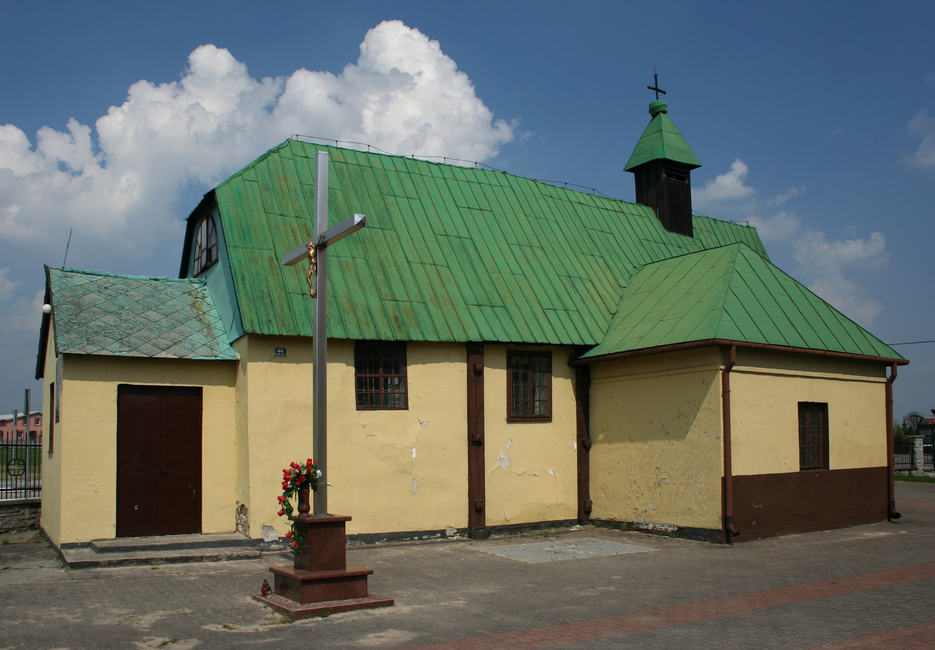 Zabytkowy kościół św. Józefa Robotnika w Popowie, woj. śląskie